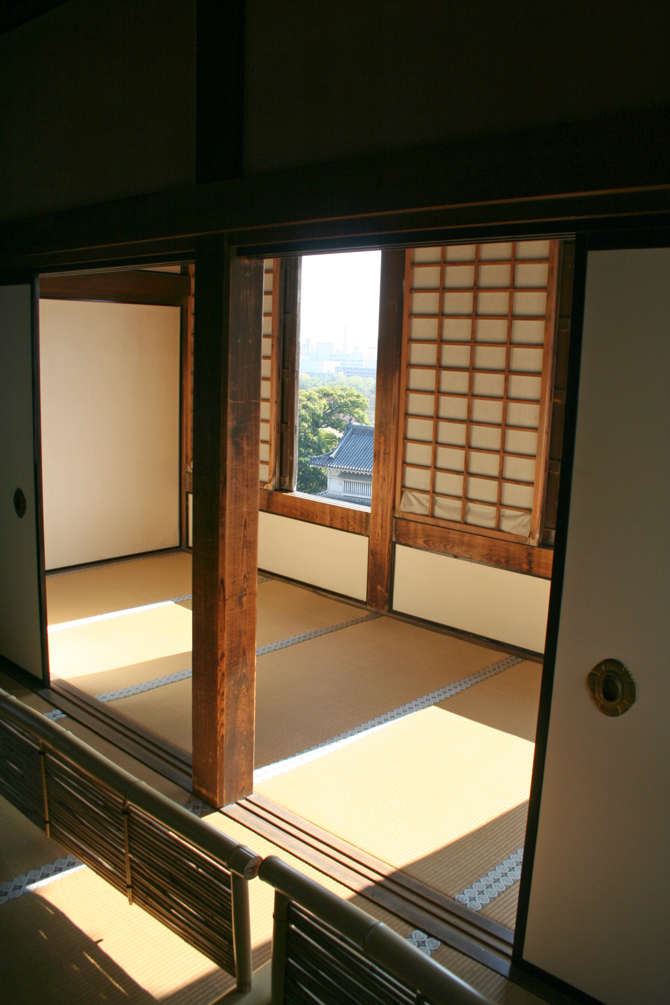 2009年秋の姫路城。 化粧櫓の南側部分。